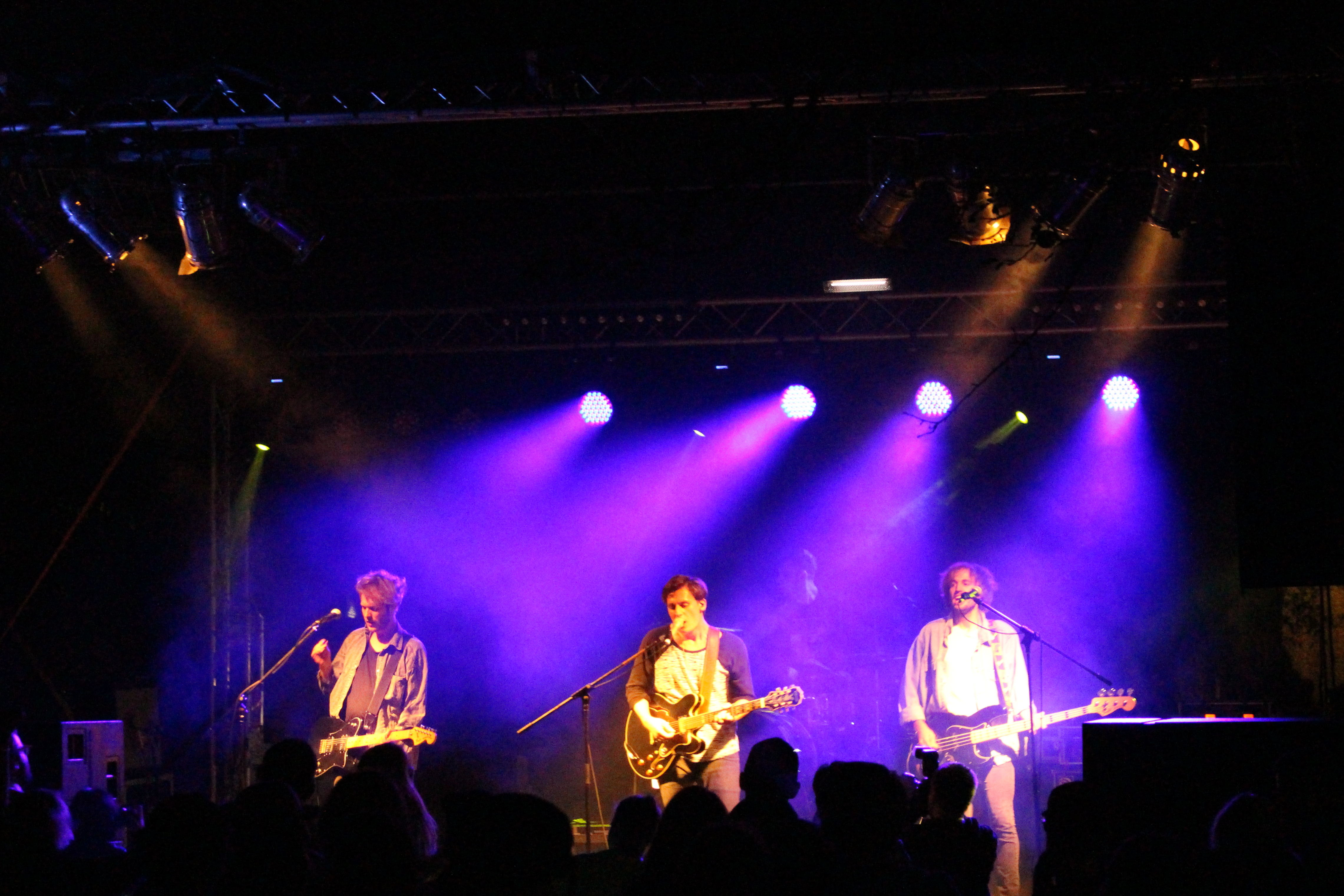 Festivalsommer This photo was created with the support of donations to Wikimedia Deutschland in the context of the CPB project "Festival Summer".